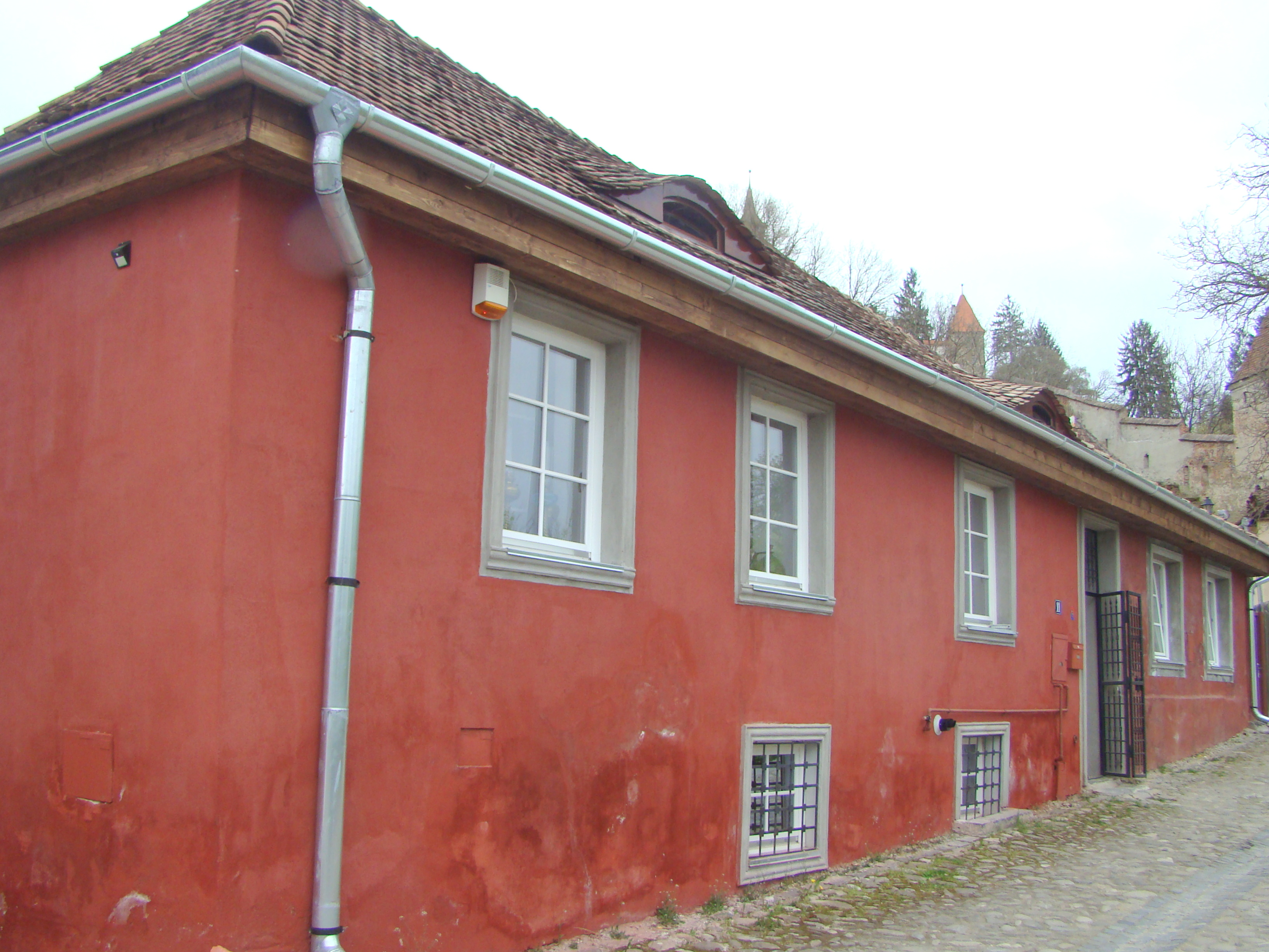 Casă, municipiul Sighișoara, str. Zidul Cetății 11 sec. XVIII, modif. sec. XX